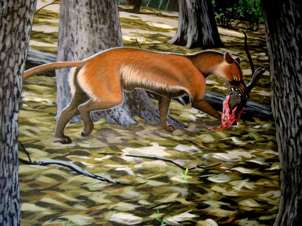 Cormocyon copei, a borophagine dog